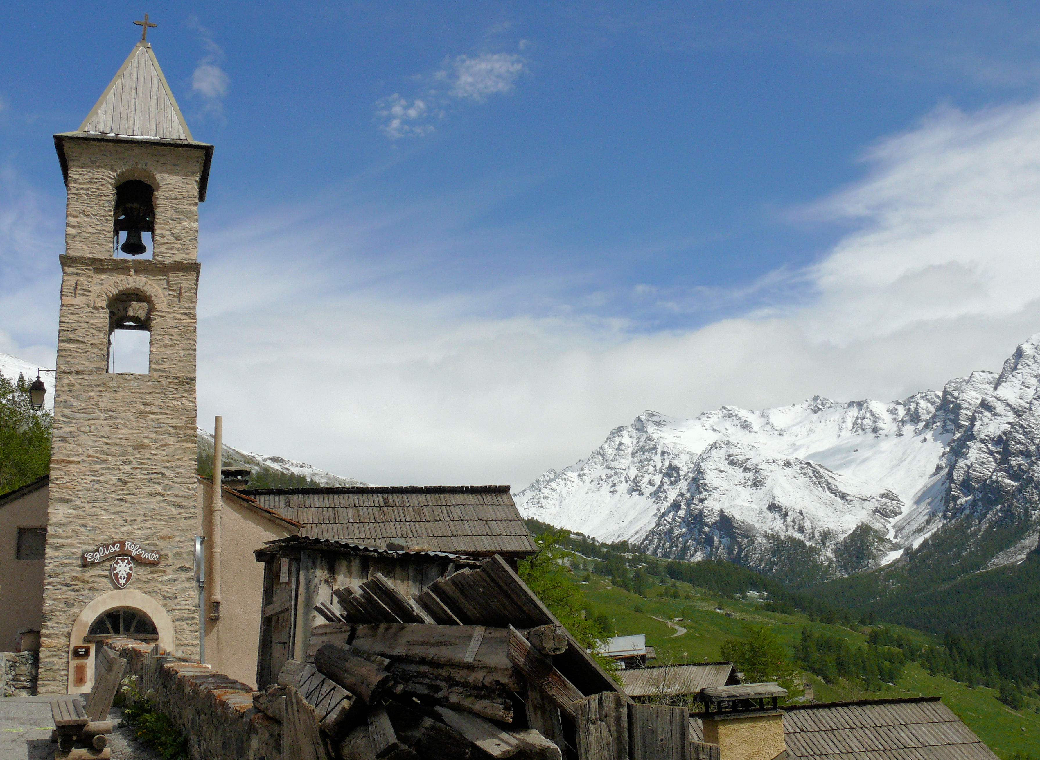 Saint-Véran - Eglise réformée